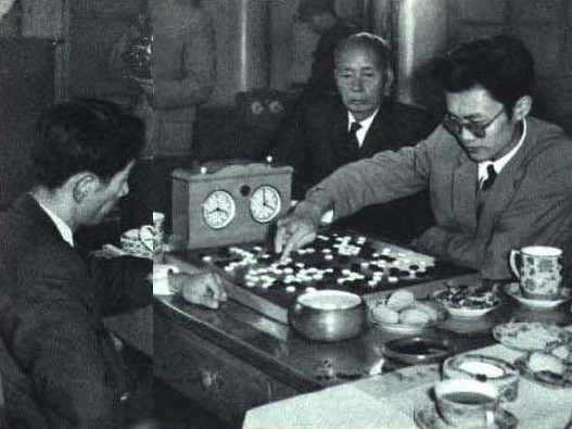 1964-05 1964年 右侧为五段选手陈祖德